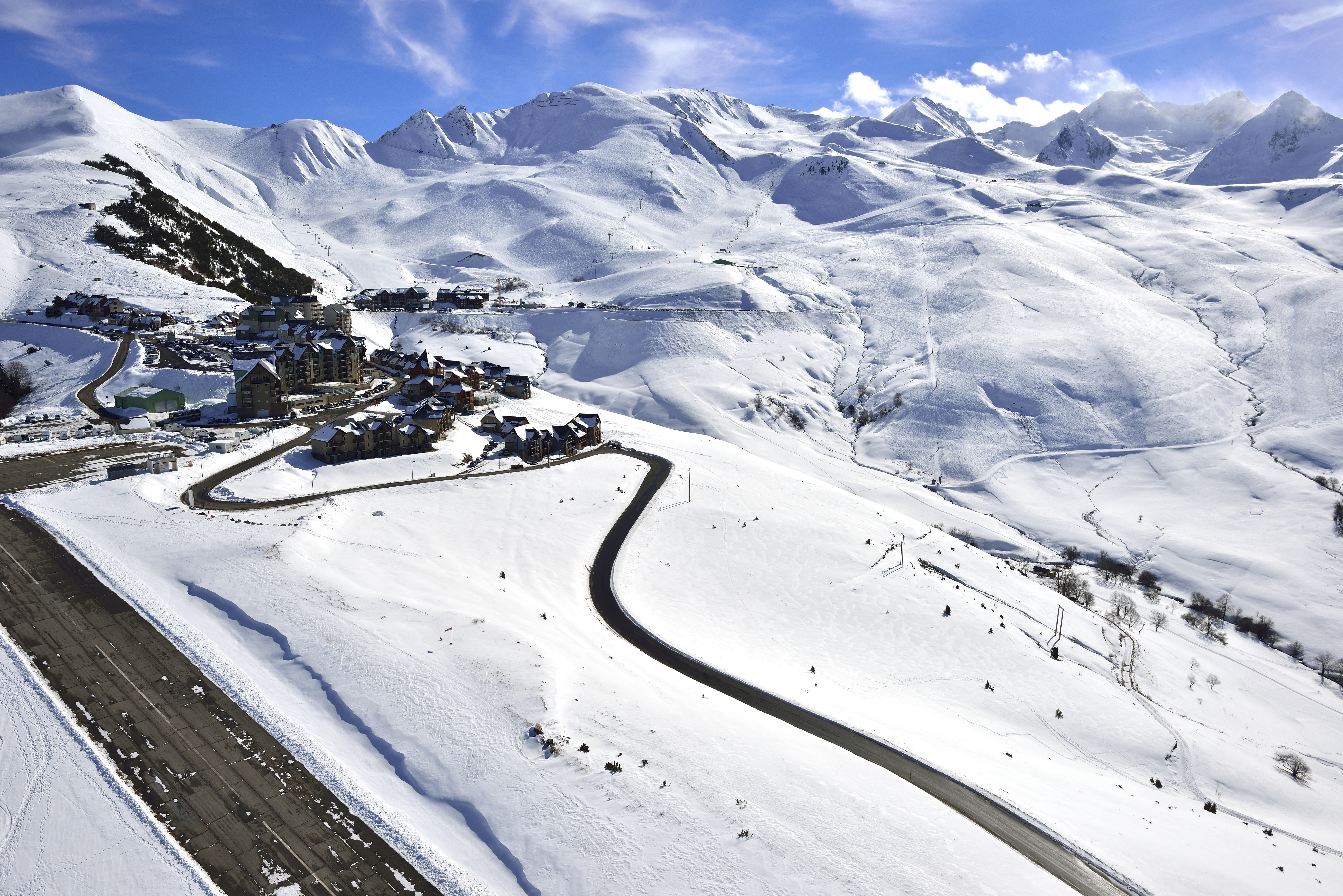 Vue de Peyresourde, versant en Hautes-Pyrénées de la station de Peyragudes.